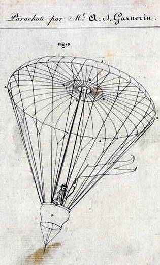 Zeichnung von A.-J. Garnerins Fallschirm. TITLE: Parachute par Mr. A.J. Garnerin CALL NUMBER: LOT 13404, no. 3 [P&P] Find any corresponding online LOT(group) record REPRODUCTION NUMBER: LC-DIG-ppmsca-02503 (color copy scan) No known restrictions on publication. SUMMARY: Technical illustration shows a man, possibly André Jacques Garnerin, standing in the basket of a descending parachute. MEDIUM: 1 print : etching. CREATED/PUBLISHED: [between 1795 and 1802] NOTES: Title from item. "Fig. 10" from an unidentified publication. Tissandier collection. SUBJECTS: Garnerin, André Jacques, 1769-1823--Associated objects. Parachutes--1790-1810. FORMAT: Technical illustrations 1790-1810. Etchings 1790-1810. REPOSITORY: Library of Congress Prints and Photographs Division Washington, D.C. 20540 USA DIGITAL ID: (color copy scan) ppmsca 02503